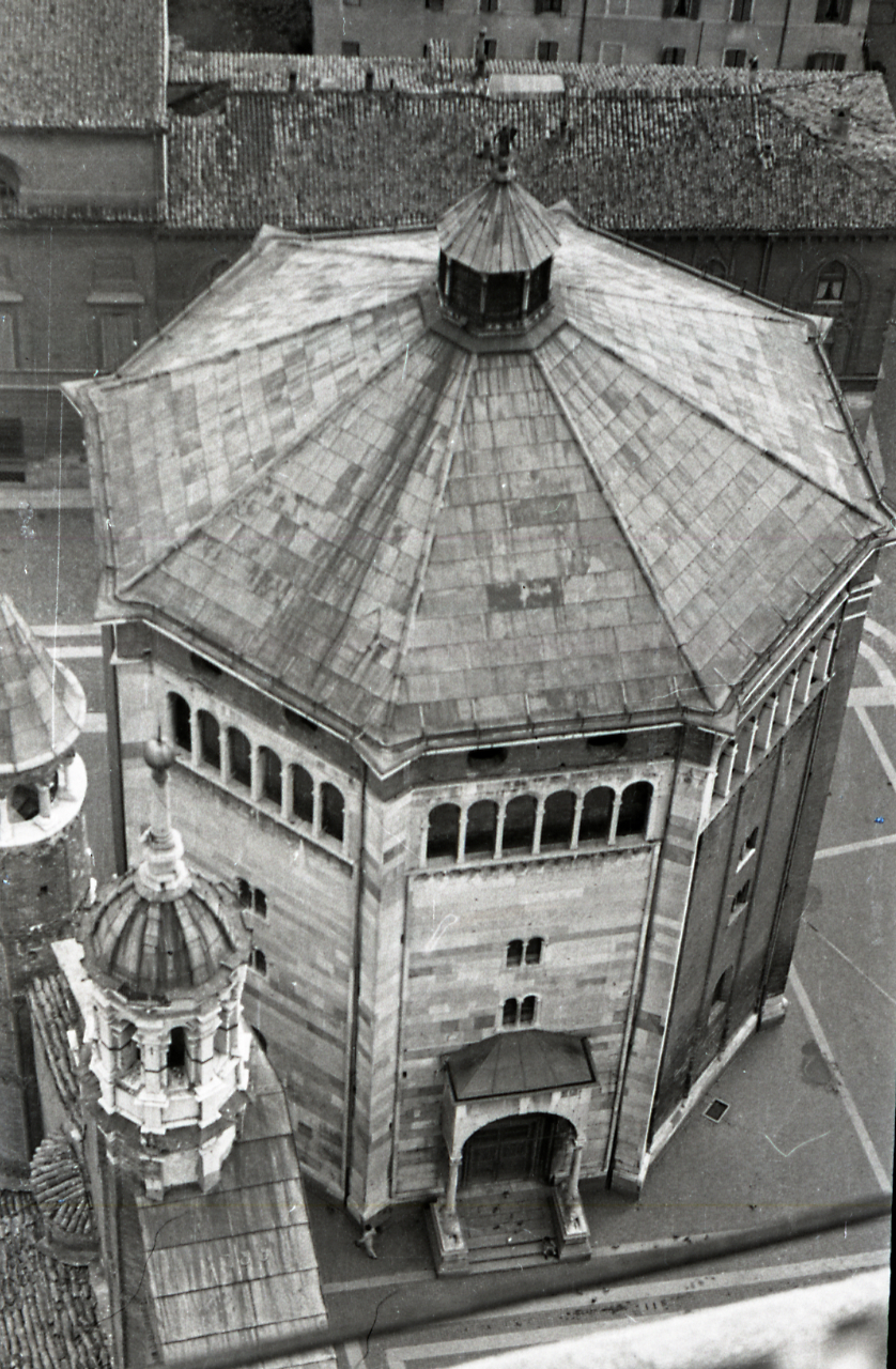 Servizio fotografico : Parma, 1970 / Paolo Monti. - Strisce: 1, Fotogrammi complessivi: 1 : Negativo b/n, gelatina bromuro d'argento/ pellicola ; 35 mm. - ((Sul portanegativi: [NIKMAT?] Agfa 137 Superpan. - Il fotogramma non è numerato, è stato quindi identificato con il n. 1